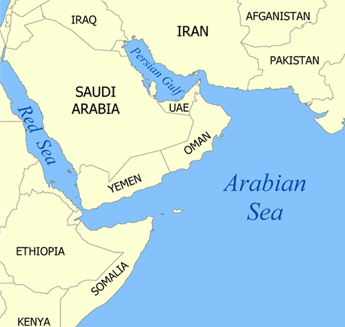 Arabian Sea map (cropped)